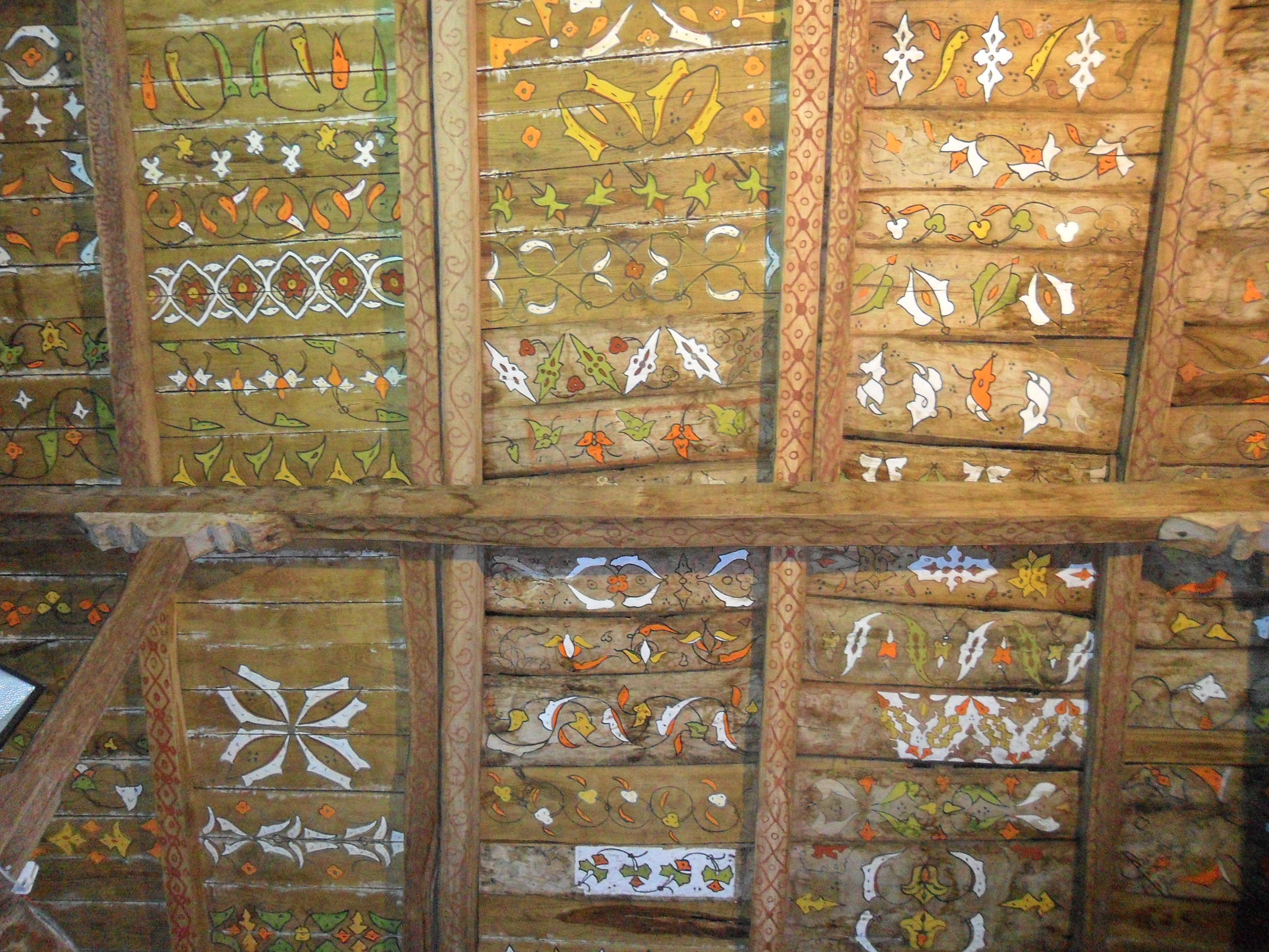 Samsun'un Çarşamba ilçesindeki Göğceli Mezarlığı içerisinde yer alan Göğceli Camii'nin tavan detayı.